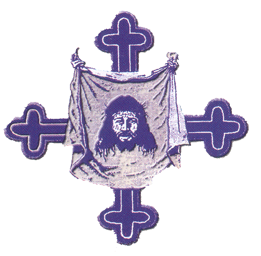 Emblema de la Hermandad de la Santa Mujer Verónica de Ocaña (Toledo)